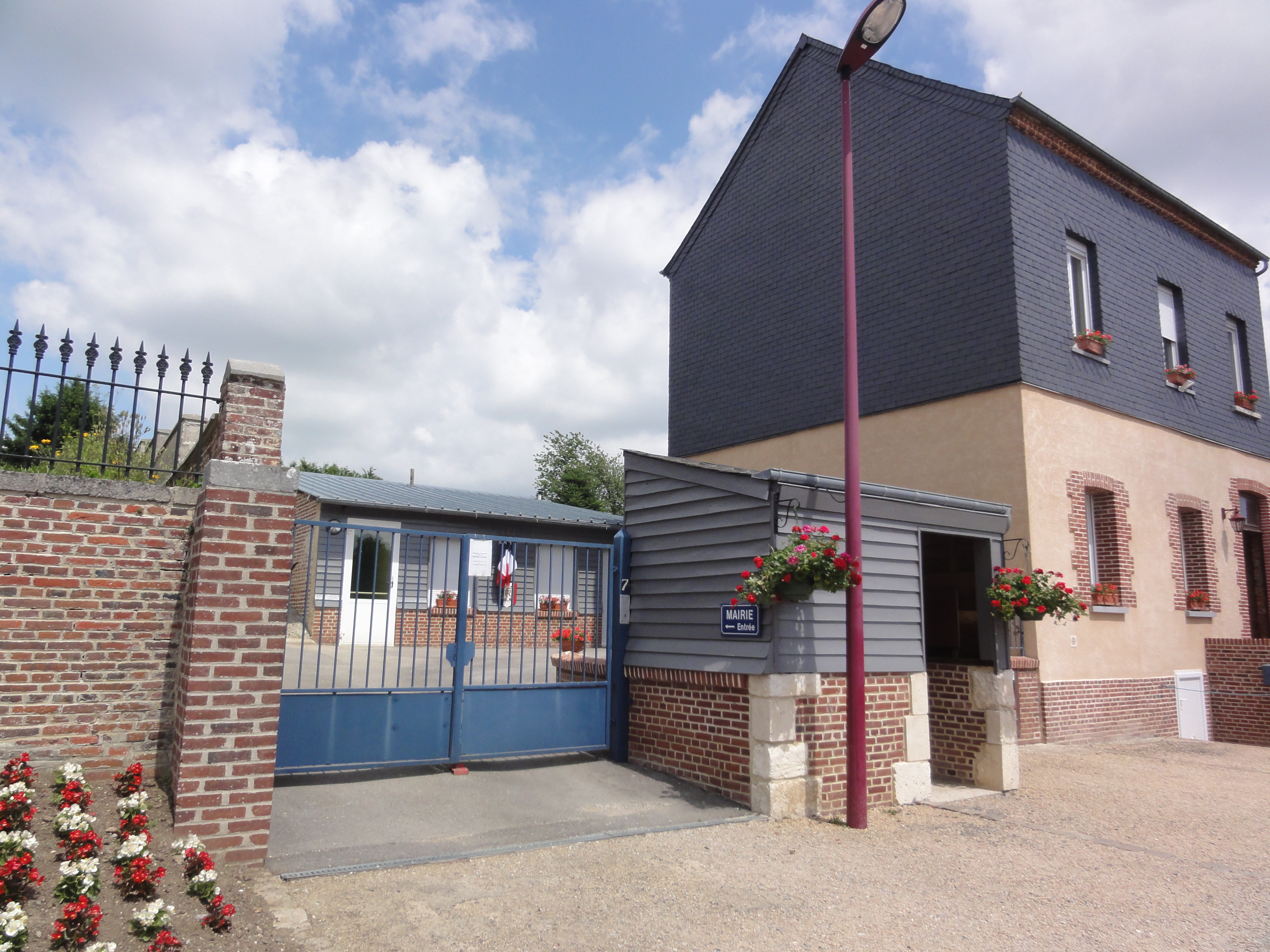 Iviers (Aisne) mairie